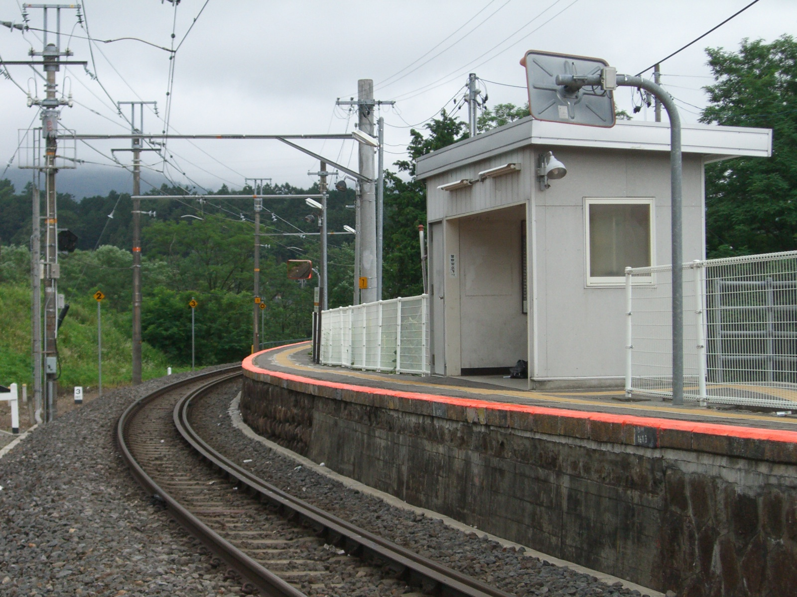 大田切駅